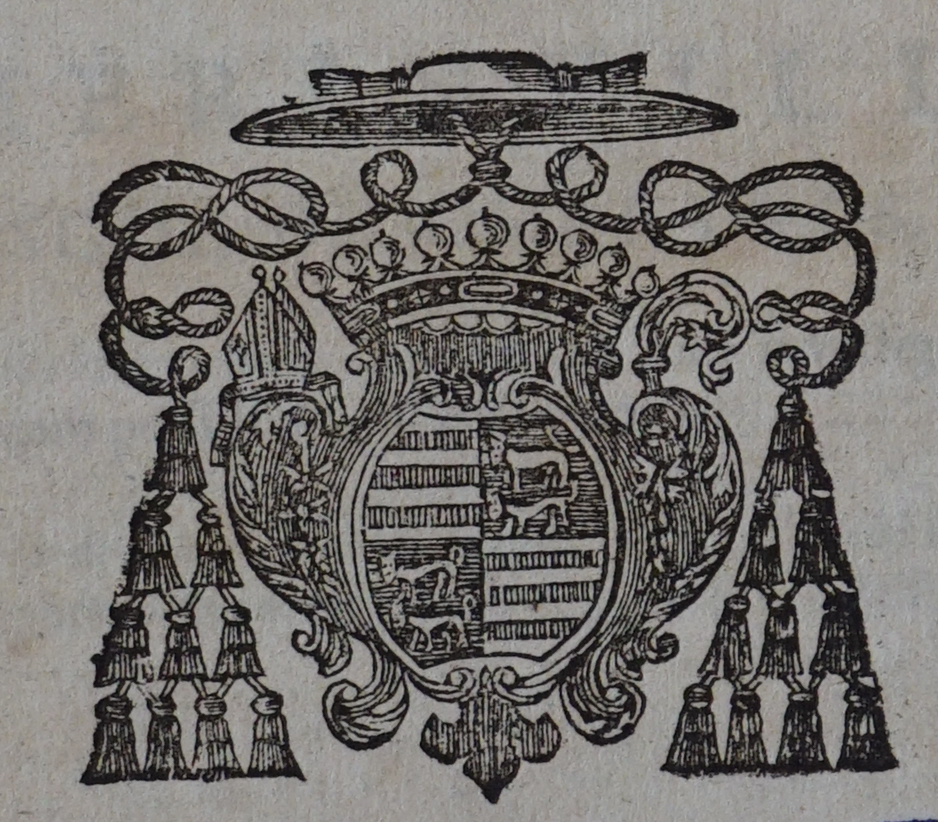 oraison funèbre de Charles-François des Montiers de Mérinville dite par M. de Voiepierre. Imprimé par la veuve J. ROux. Ecartelé aux 1 et 4 d'argent à trois fasces de gueules, aux 2 et 3 d'azur à deux lions passants d'or, l'un sur l'autre.